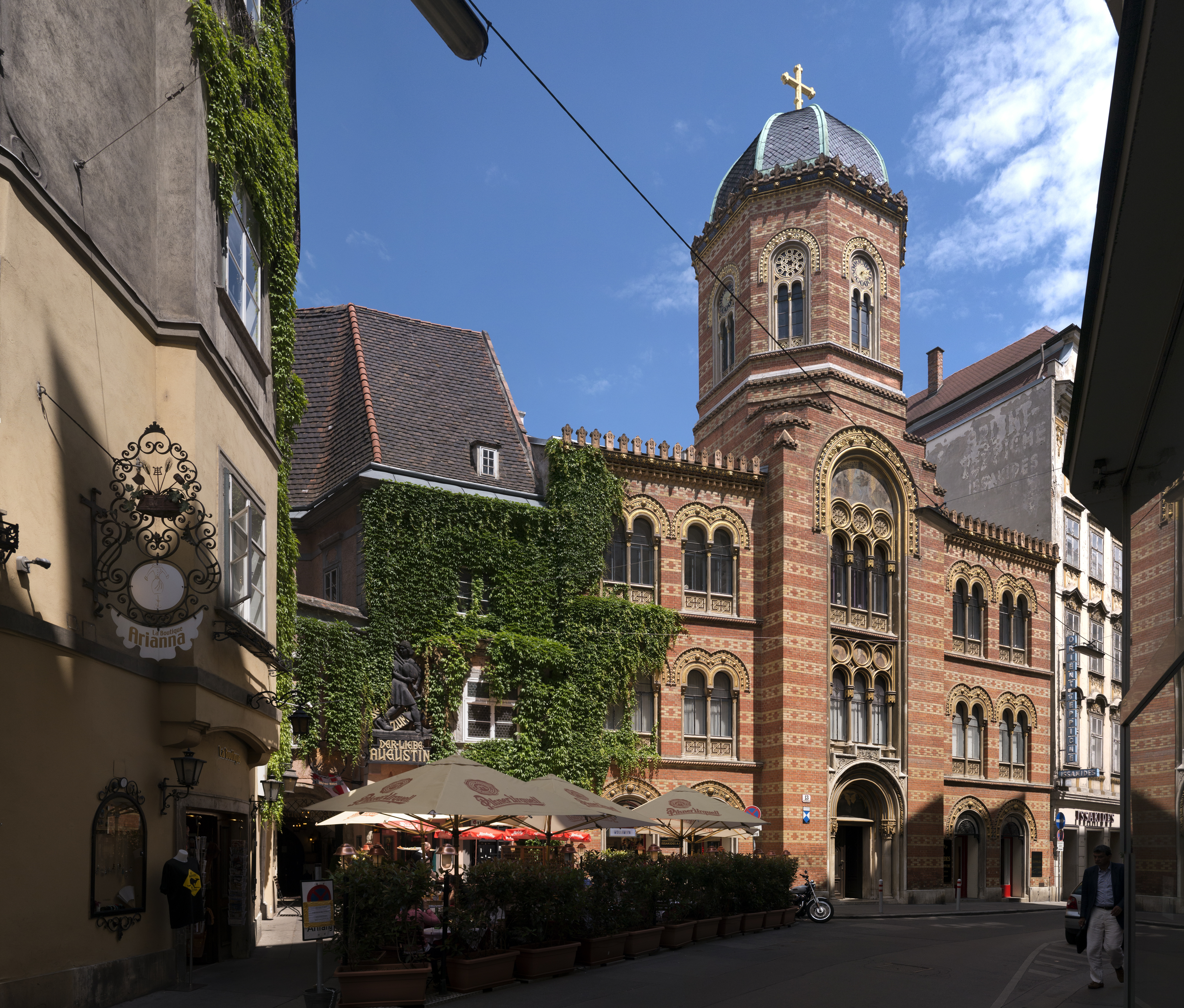 Griechisch orthodoxe Kathedrale, Wien